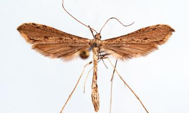 Agdistis linnaei